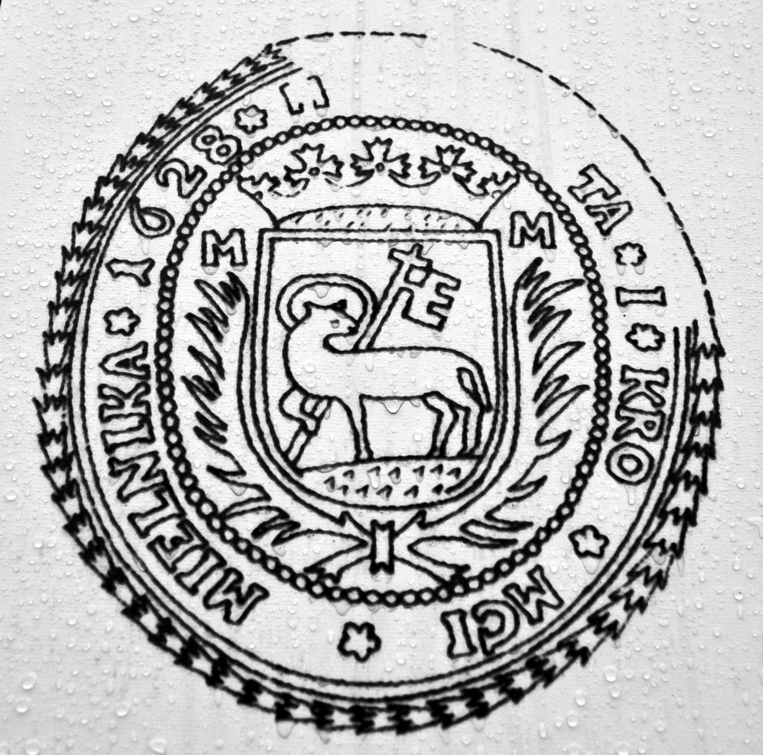 Pieczęć miasta Mielnika z tekstem: MIASTA KRO(LEWSKIEY) M(OŚ)CI MIELNIKA 1628